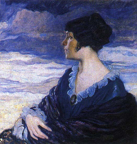 Делла-Вос-Кардовская, Ольга Людвиговна. Автопортрет. Государственный Русский музей, Санкт-Петербург